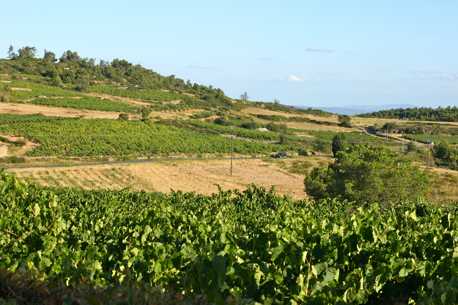 Vignoble du Minervois avant les vendanges